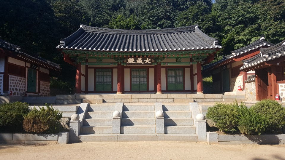 인천 향교